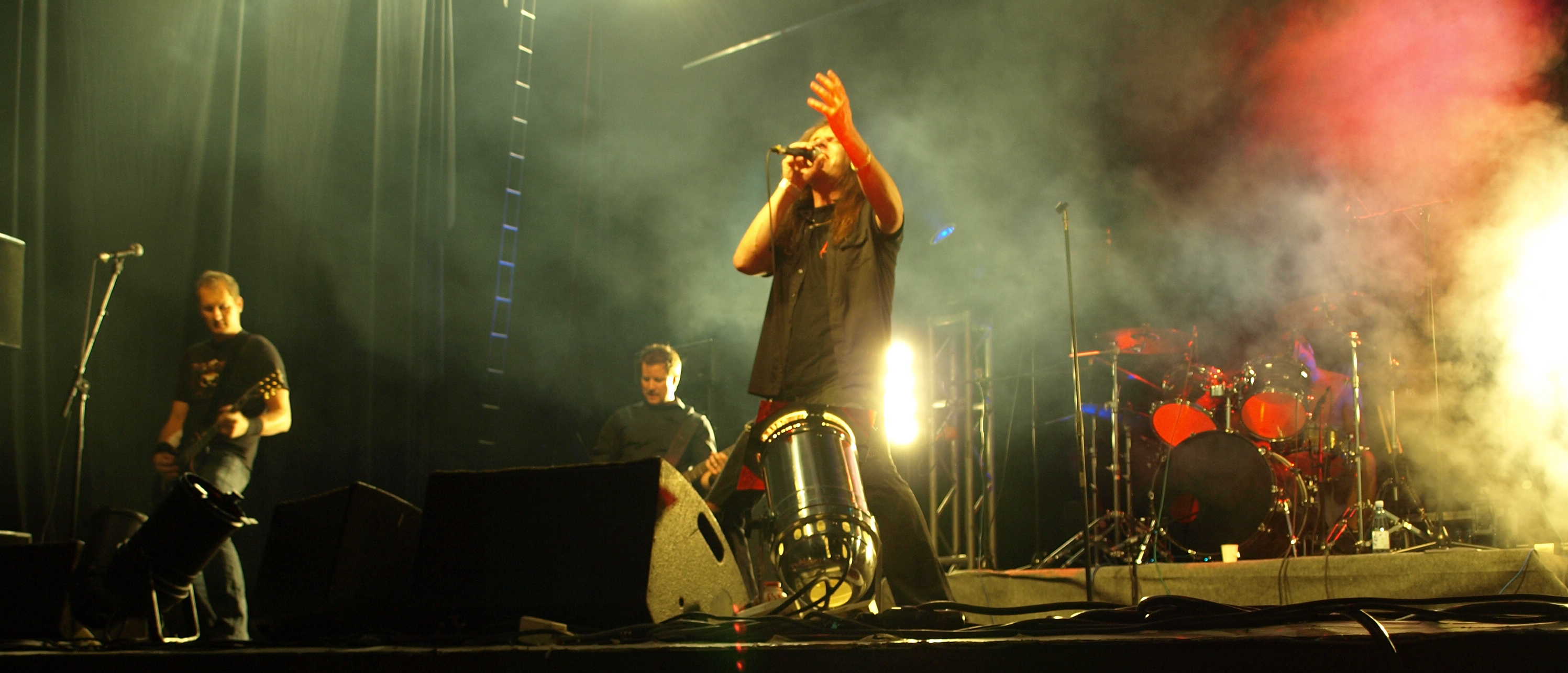 Die schwedische Heavy-Metal-Band Astral Doors bei ihrem Auftritt am Jalometalli 2008 in Oulu.